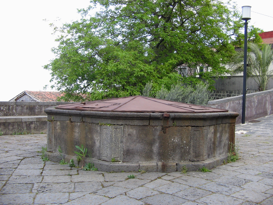 Pisano Etneo - La Cisternazza - Foto D. Pennisi